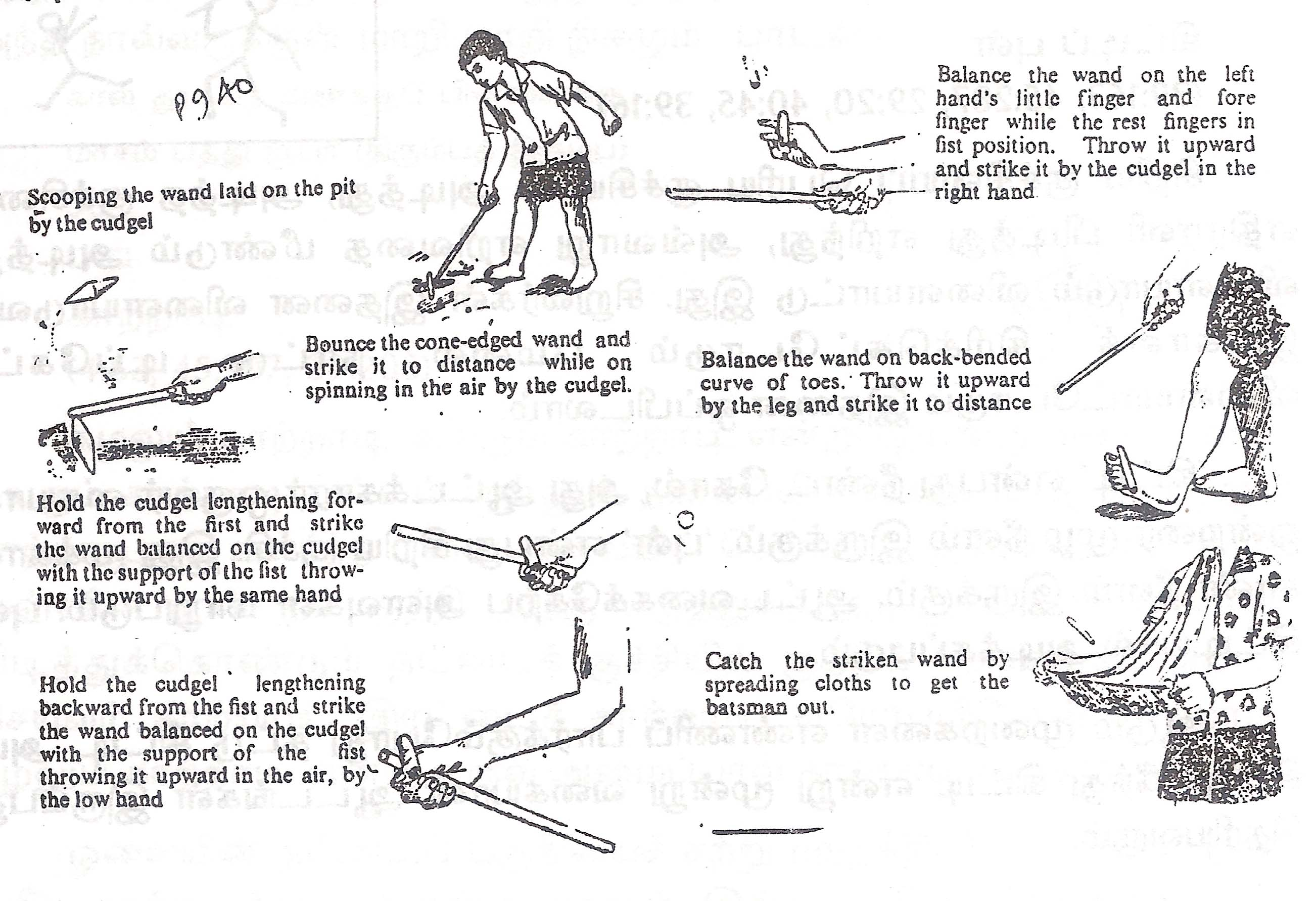 Kittip-pullu, an indigenous game of India, sone of the drawings are taken from the book by Majumdar, Shrimat Dattatreya Cintaman, (editor), Encyclopedia of Indian Culture, Majumdar’s wada, Raopura, Baroda, India, 1950 and with additional drawings designed by Sengai Podhuvan and published in his book “vanishing games of Tamil Nadu” மறைகின்ற விளையாடுகள் published in 2002. The up-loader is the author of the book, quoted above.